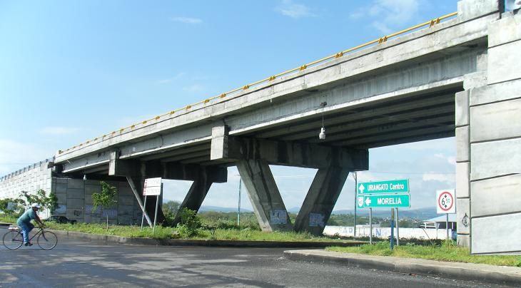 Puente de la Colonia Juarez